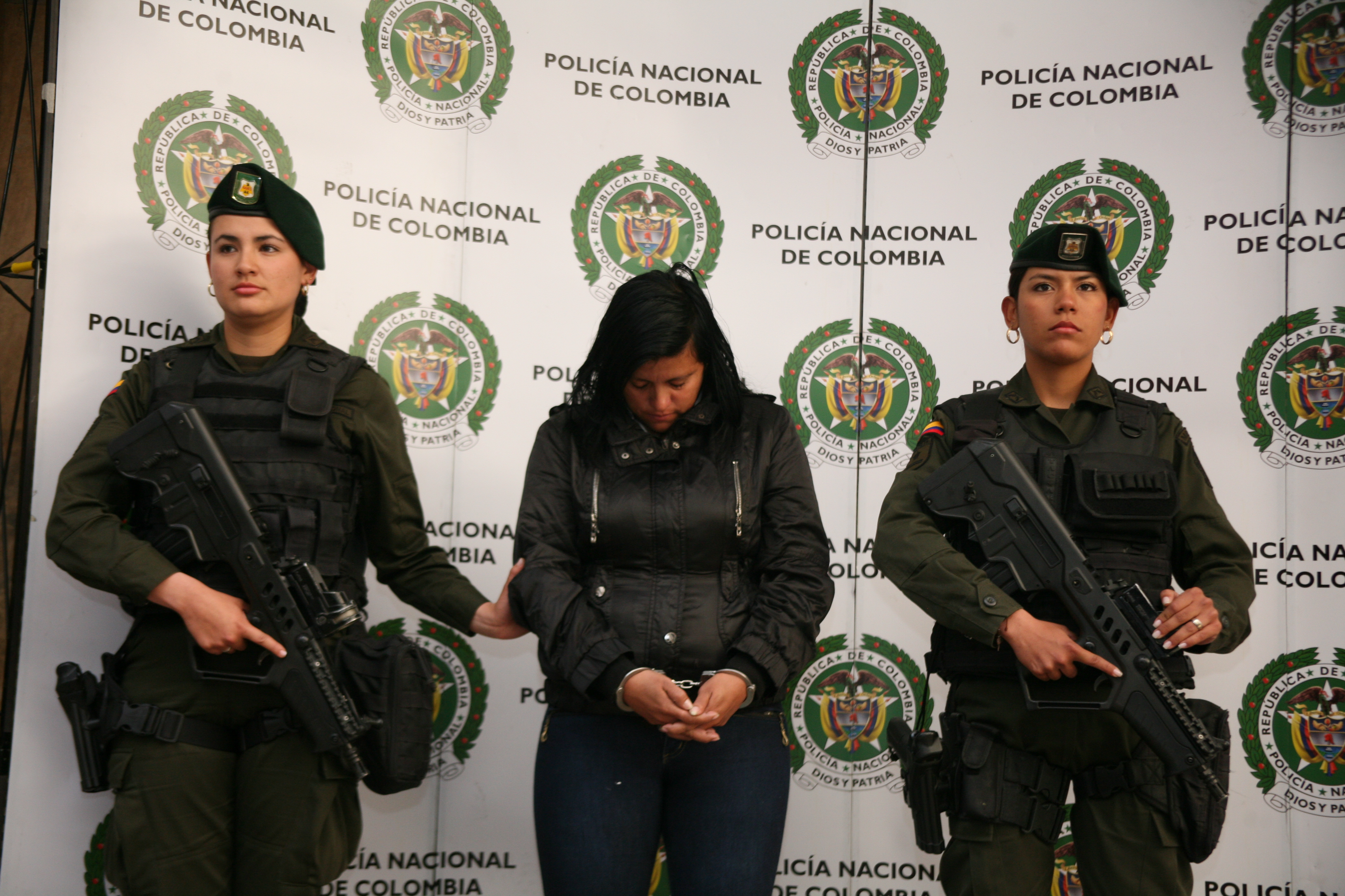 Fue capturada alias ‘Mayerly’ integrante de las Farc quien participó activamente en el atentado en donde fallecieron dos uniformados antiexplosivos en octubre de 2011